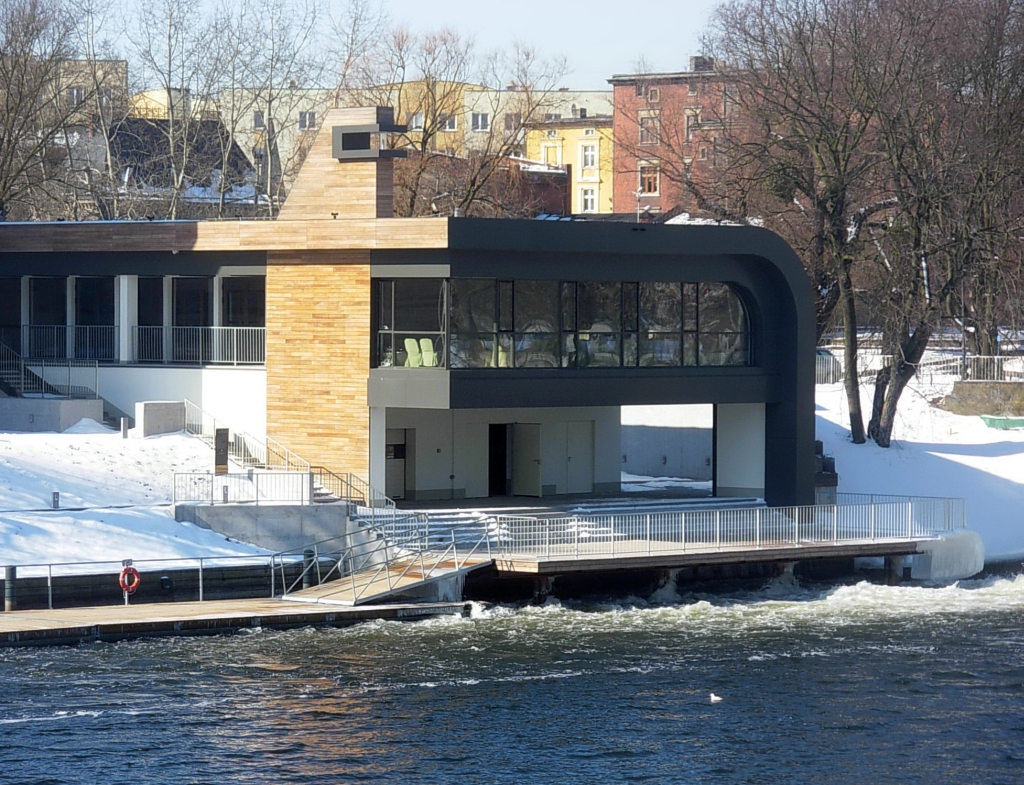 Przystań Bydgoszcz na Wyspie Młyńskiej